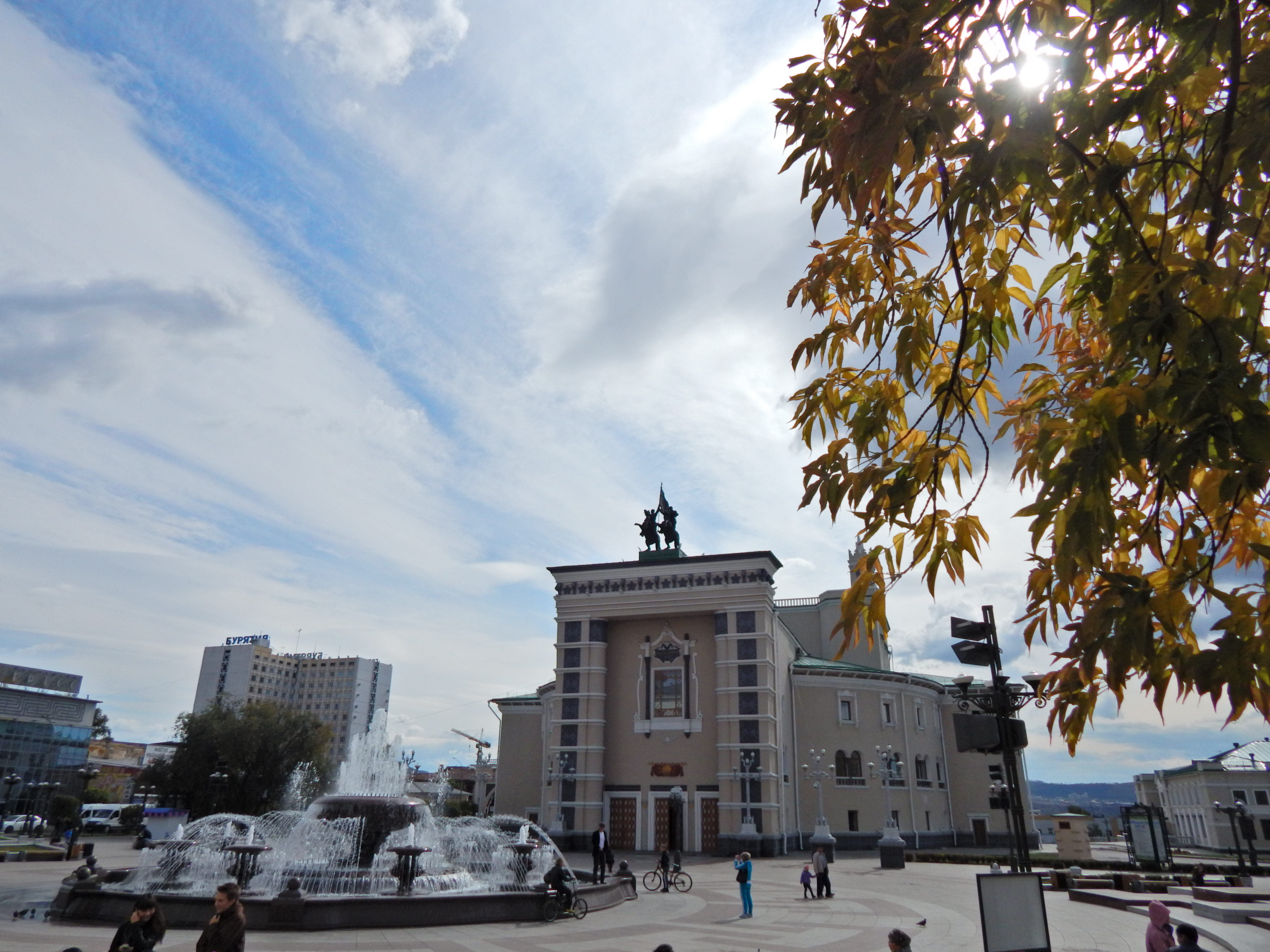 Бурятский театр оперы и балета (Республика Бурятия, Улан-Удэ, улица Ленина, 51)